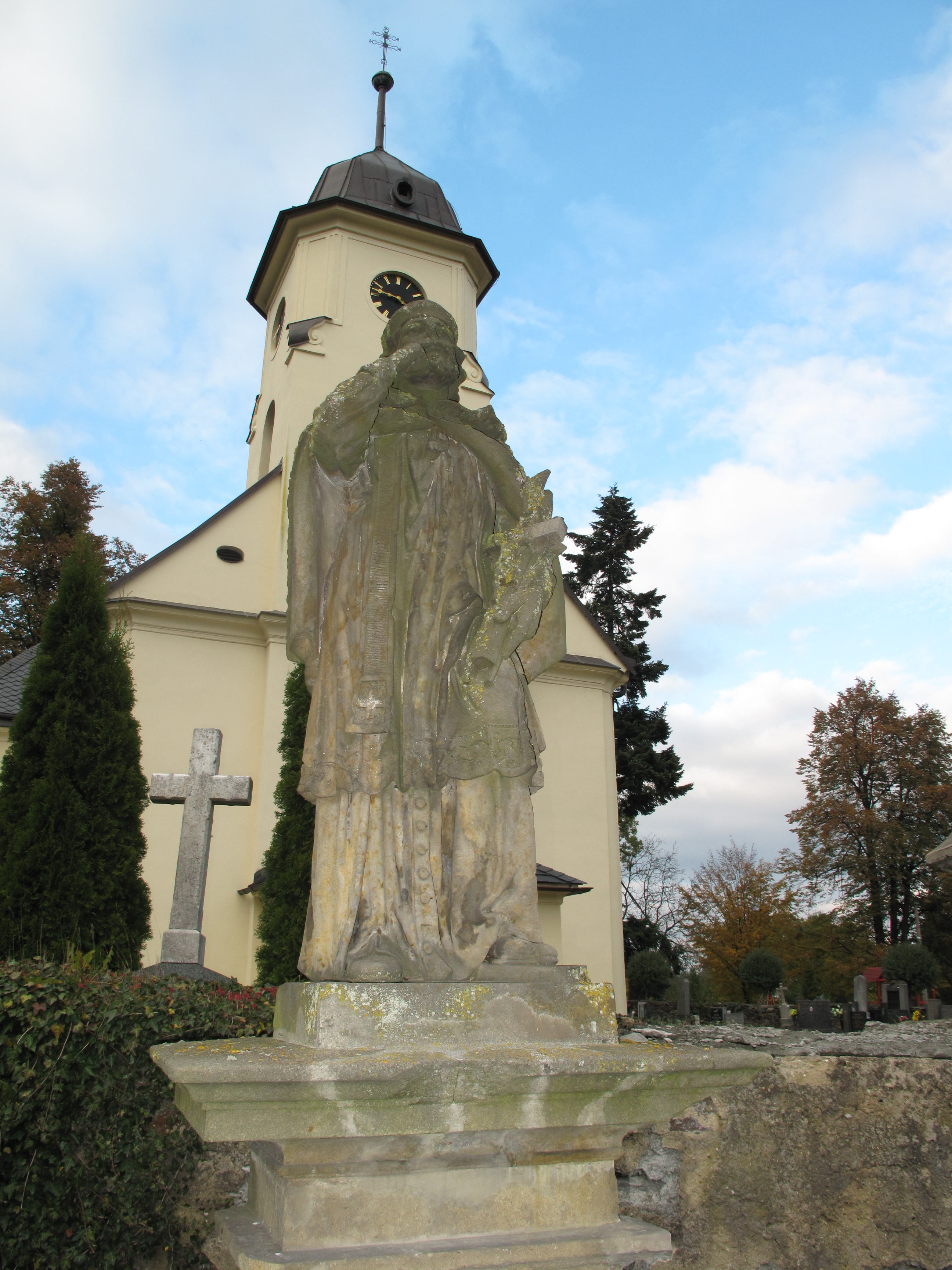 Čermná ve Slezsku. Okres Opava, Česká republika.